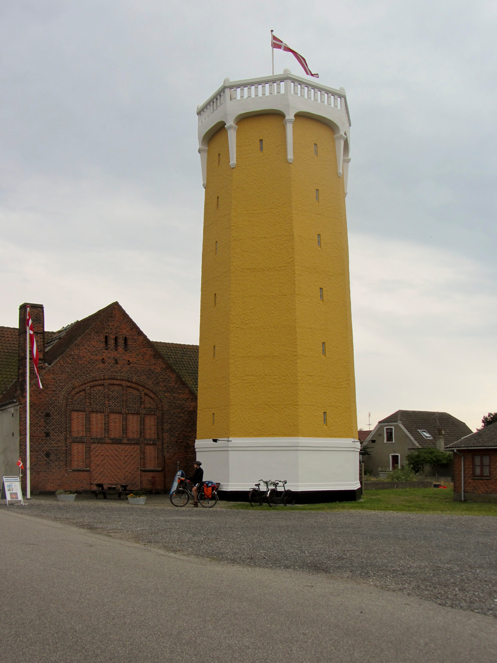 Gelber Turm mit 'Dannebrog' in Gedser auf Falster Das war ein Wasserturm und ist heute ein Aussichtsturm